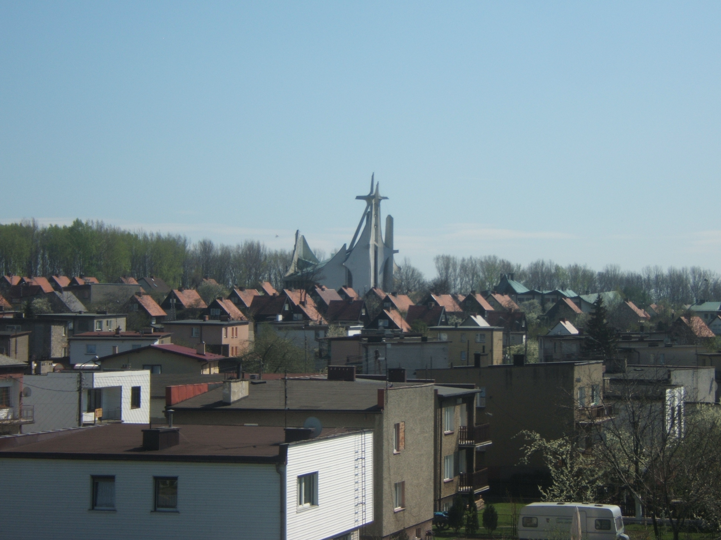 Zdjęcie przedstawiające panoramę dzielnicy Lędzin- Hołdunów.